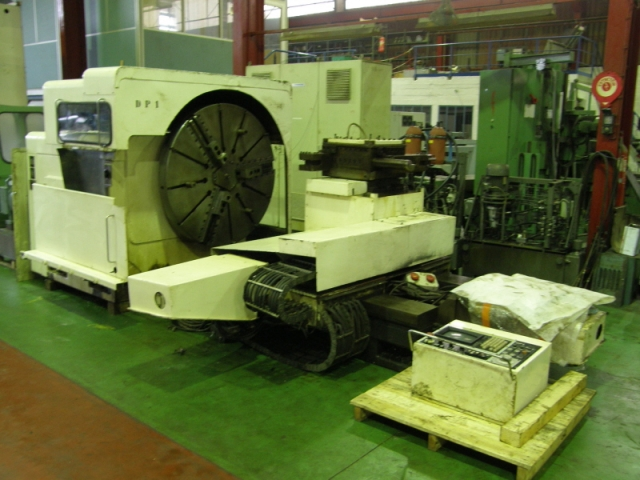 Tour frontal (démonté)